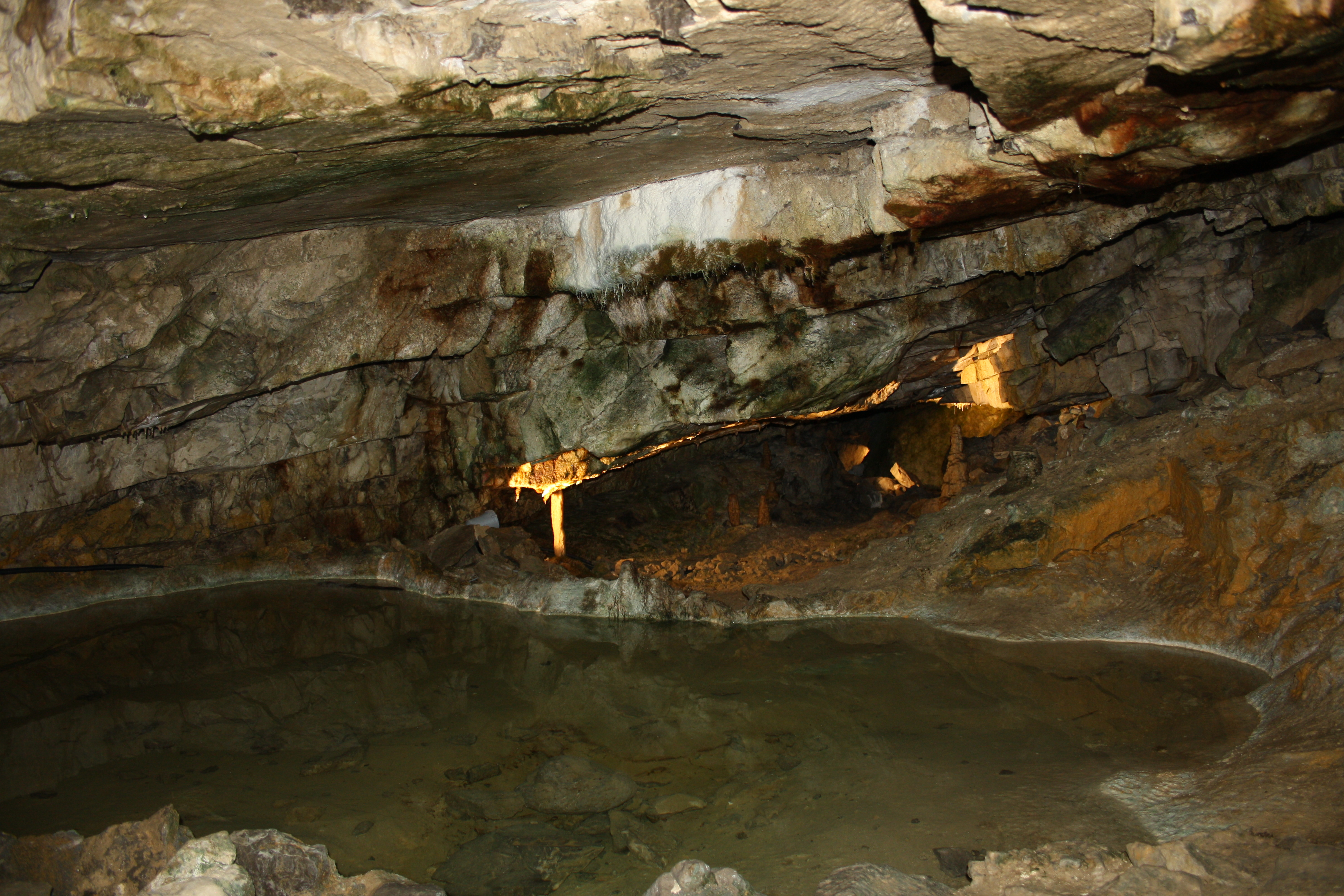 St. Beatus-Höhlen Kapitänsgrotte